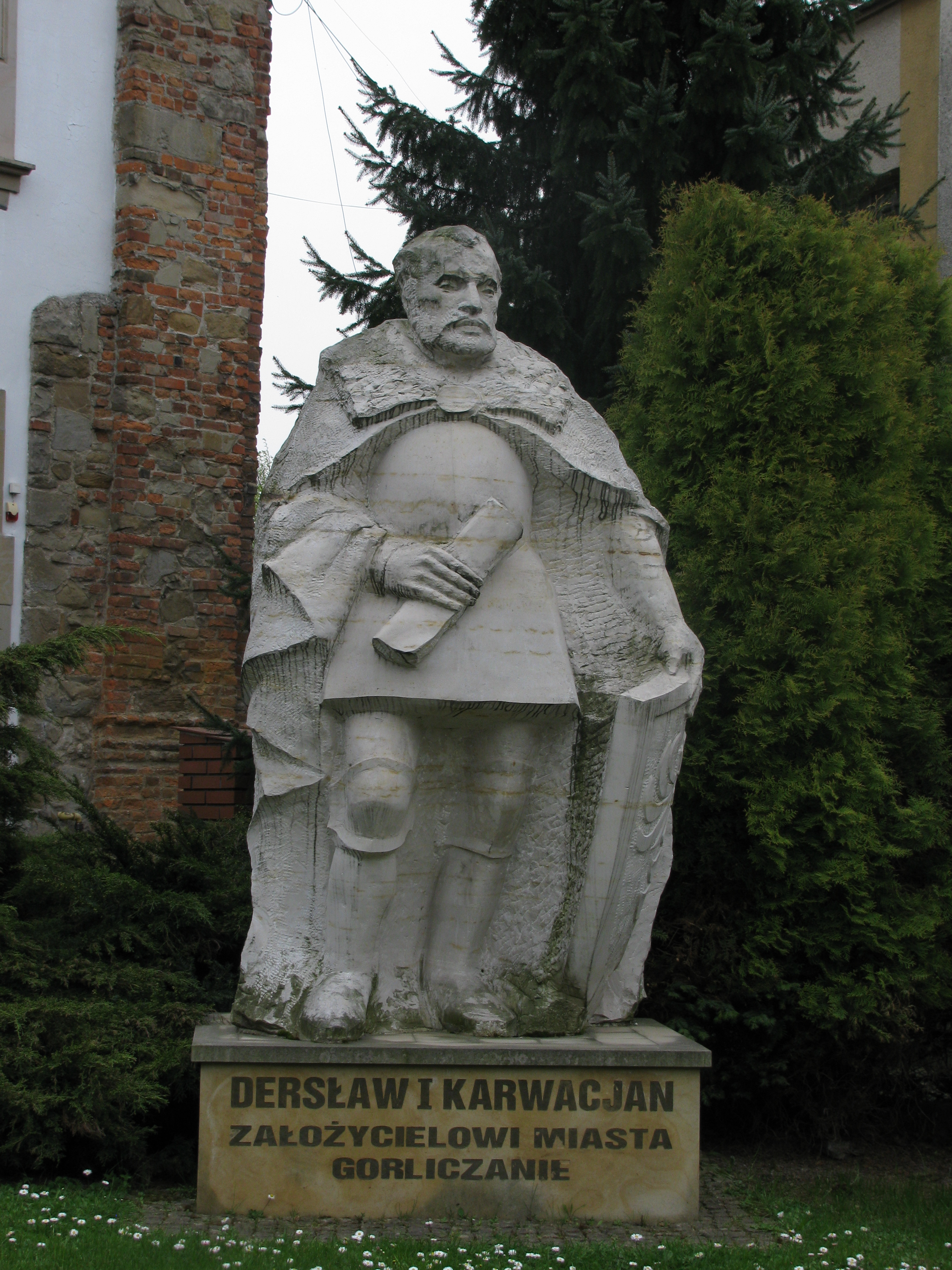 Pomnik Dersława Karwacjana - założyciela Gorlic